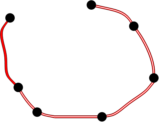 Schéma du ring de Thurnout